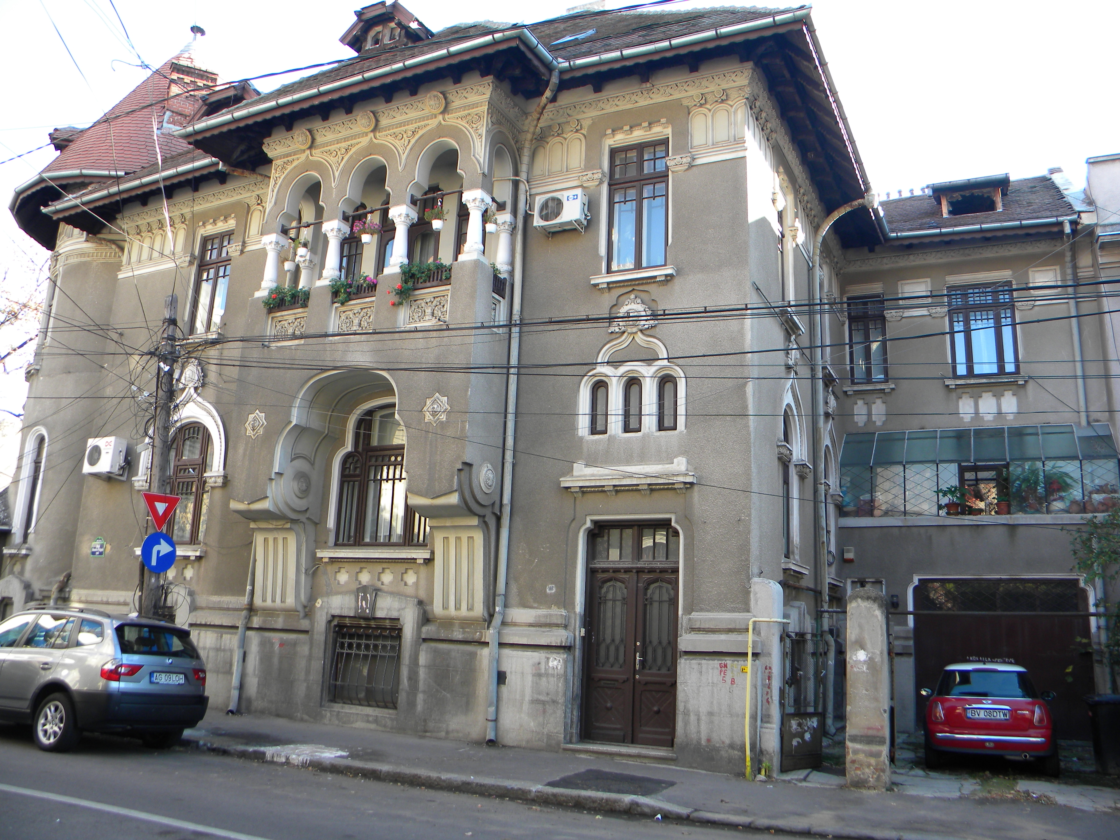 Bucuresti, Romania, Str. Alexandru Philipide nr. 20, sect. 2; (Cod B-II-m-B-19386) prim